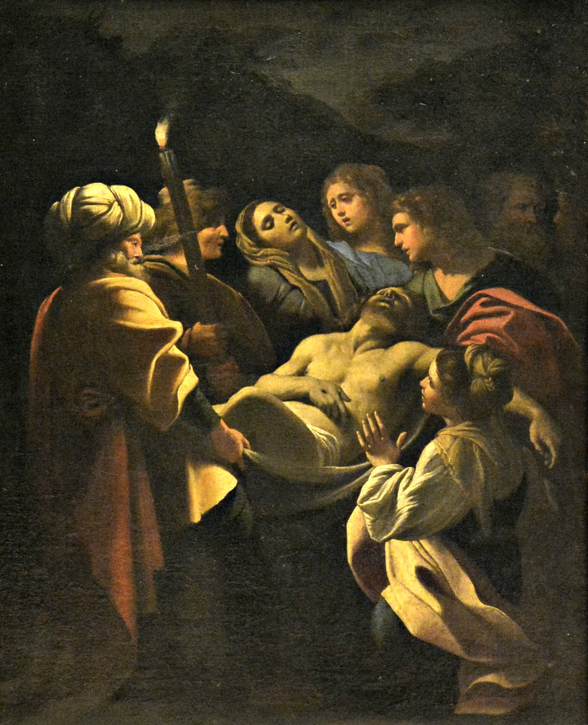 Vedi titolo